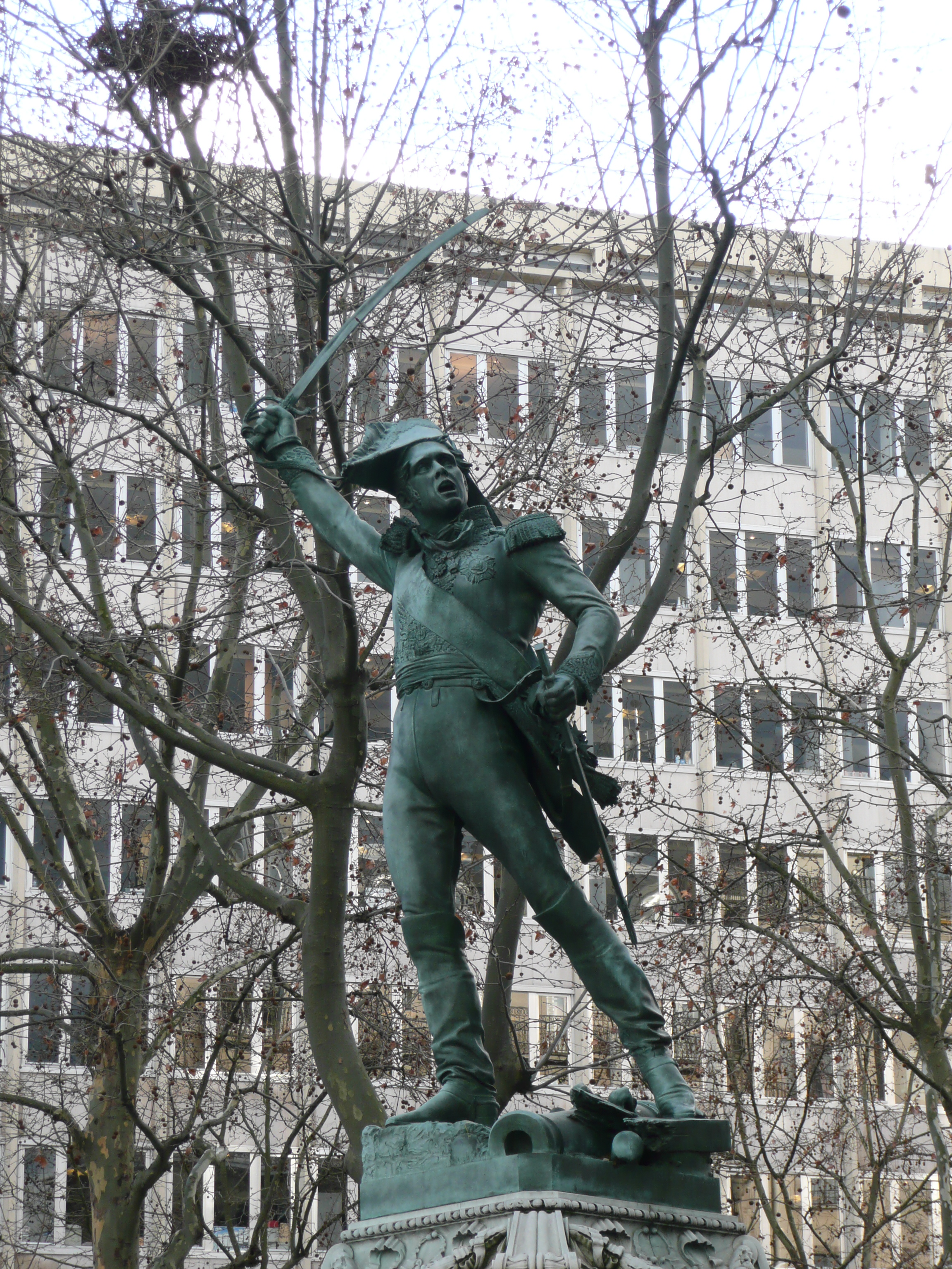 Statue de Michel Ney située Avenue de l'Observatoire à Paris.